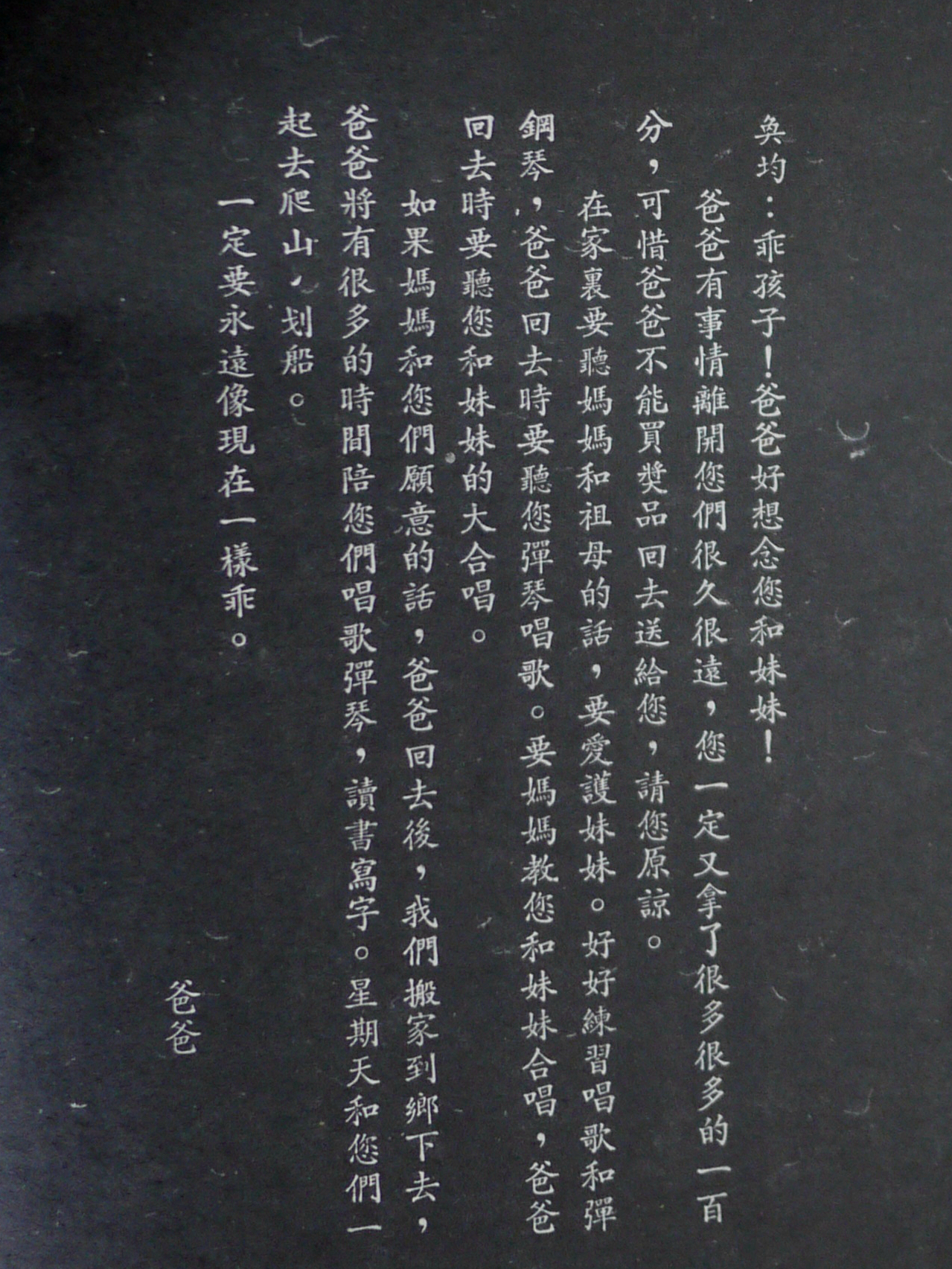 中文（台灣）: 亞洲人雜誌第2期(1980.3)，林宅血案報導：《最長的一日-記林義雄先生家門慘變》一文文首。《亞洲人》雜誌被當時的警備總部查禁，所以無版權問題。查禁政府公報請參見： 函知「亞洲人」雜誌第1卷第2期依法查禁。